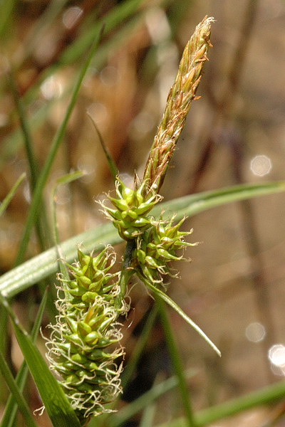 Carex demissa from Commanster, Belgian High Ardennes .